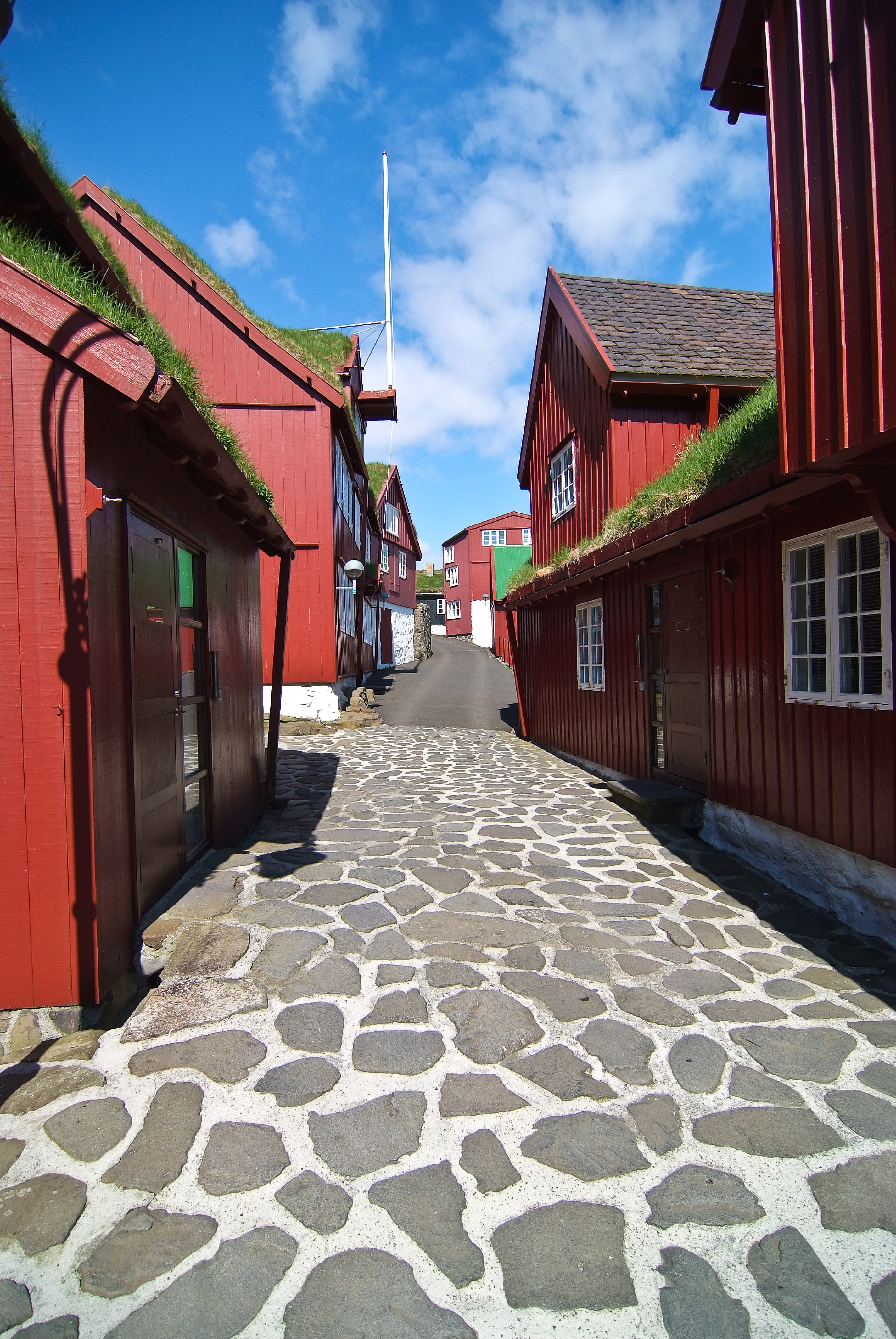 Tinganes